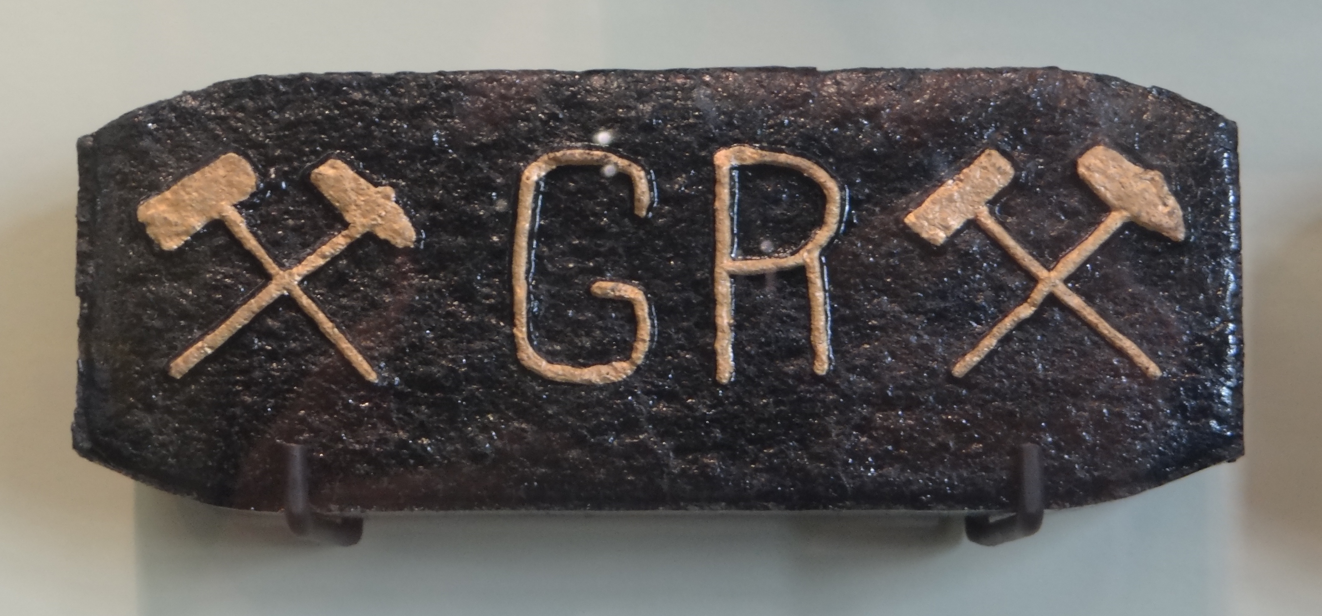 Deutsches Bergbau-Museum Bochum. Halle 19: Aufbereitung und Rohstoffveredlung. Kohlebrikettierung: Schmuckbriketts